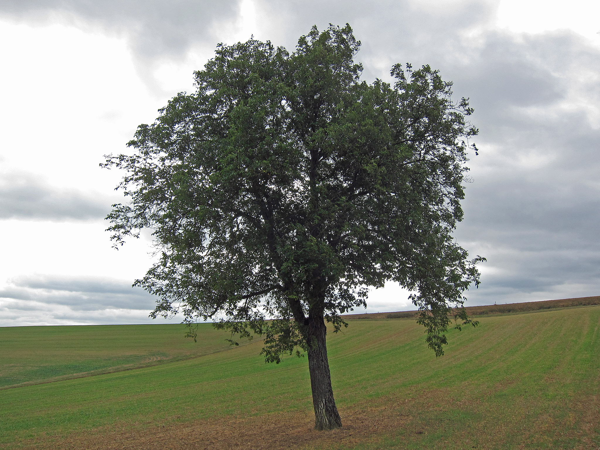 Nuss Urspringen